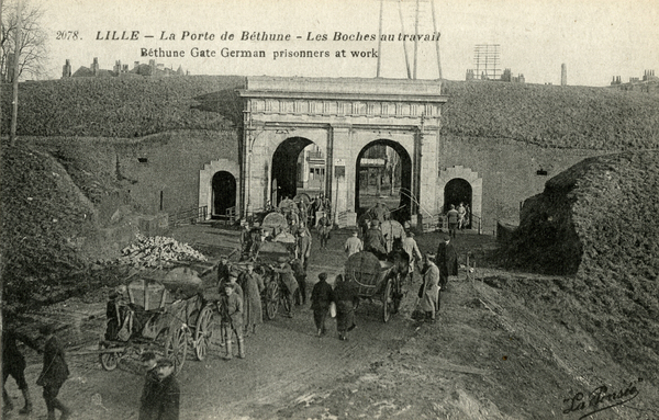 Lille. La porte de Béthune. "Les Boches au travail" - Date : 1914-1918 [1914/1918] Dimensions : 88 x 136 mm - Technique : impression photomécanique (carte postale) : phototypie